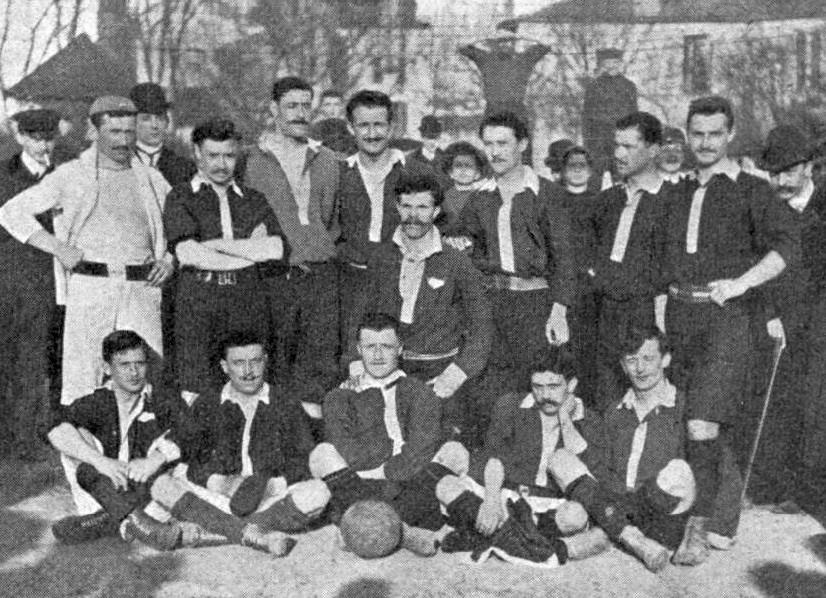 Avril 1905, le Football-Club de Paris gagne la Coupe Marnier.